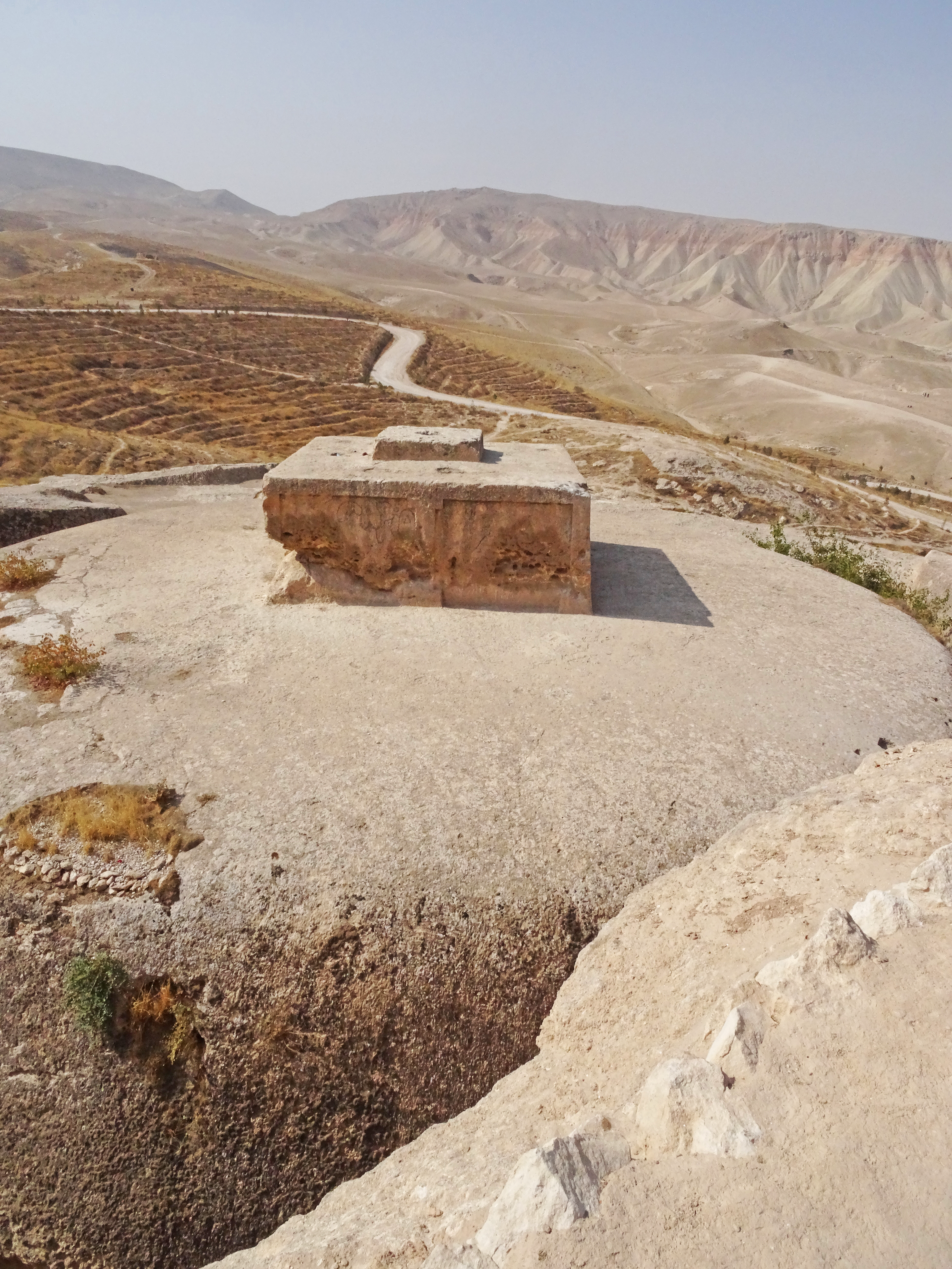 Afghanistan: Tacht-e Rostam in Samangan